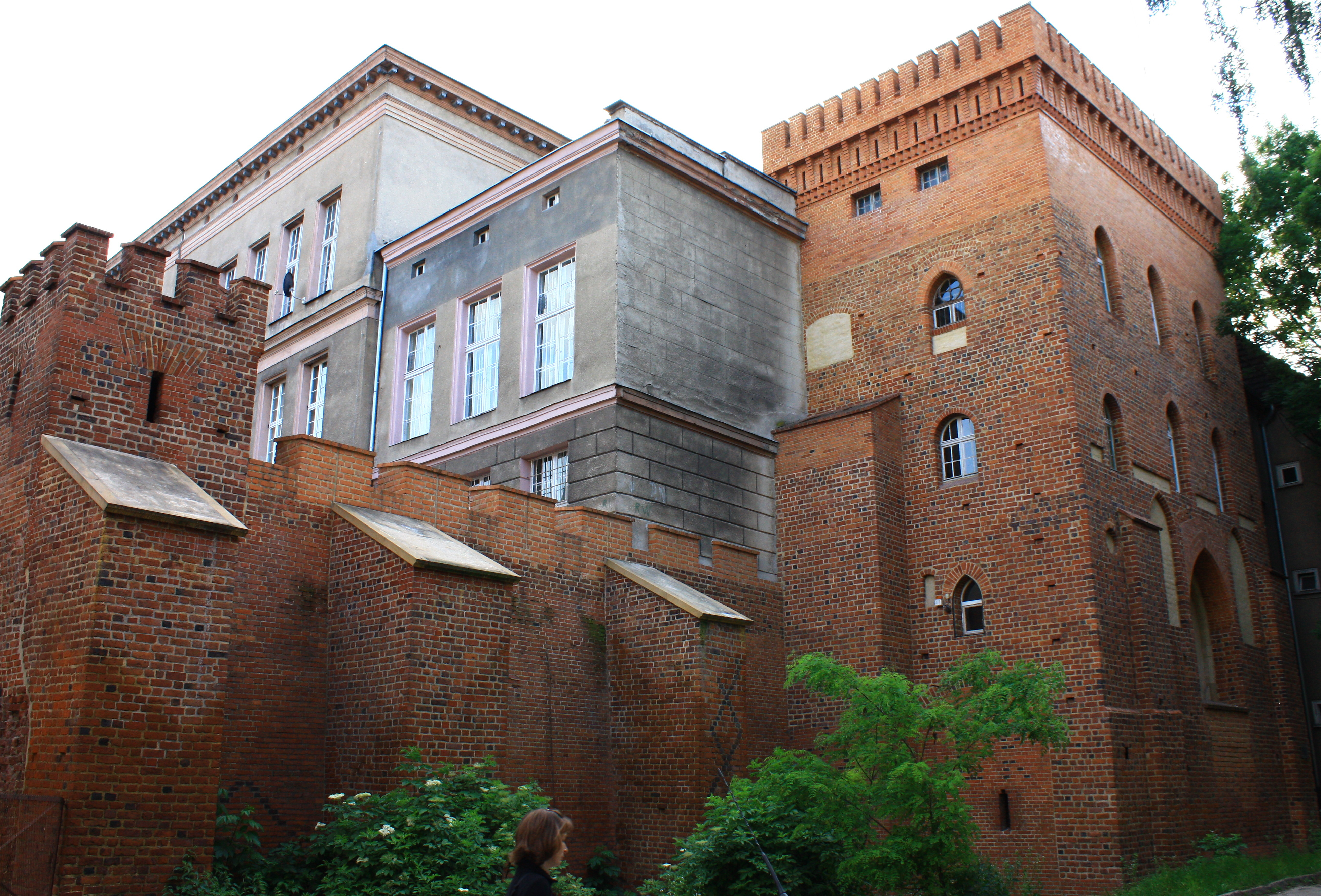 Opole, zespół murów obronnych, 1300, XVI, XIX